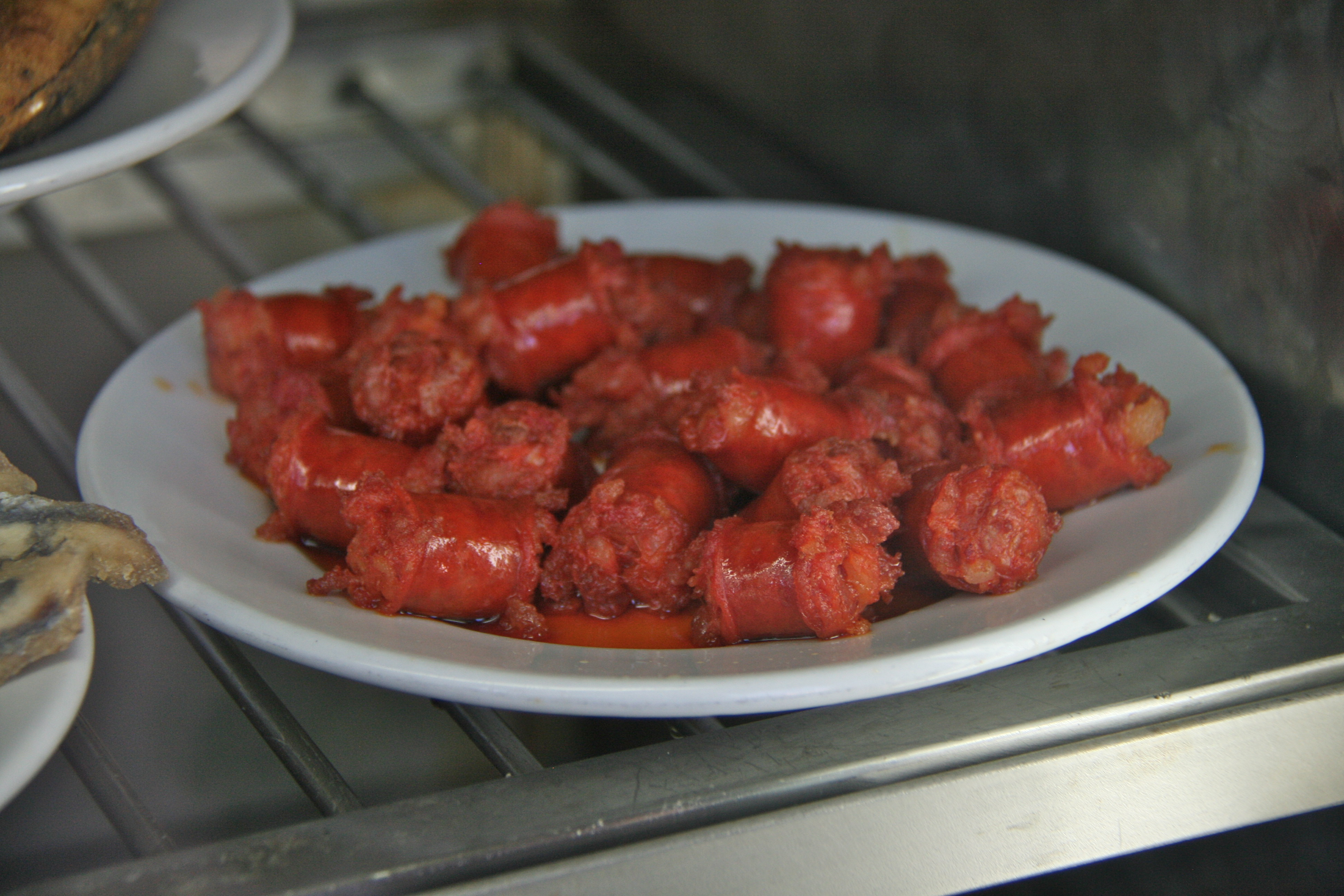 Ración de chistorra - Madrid